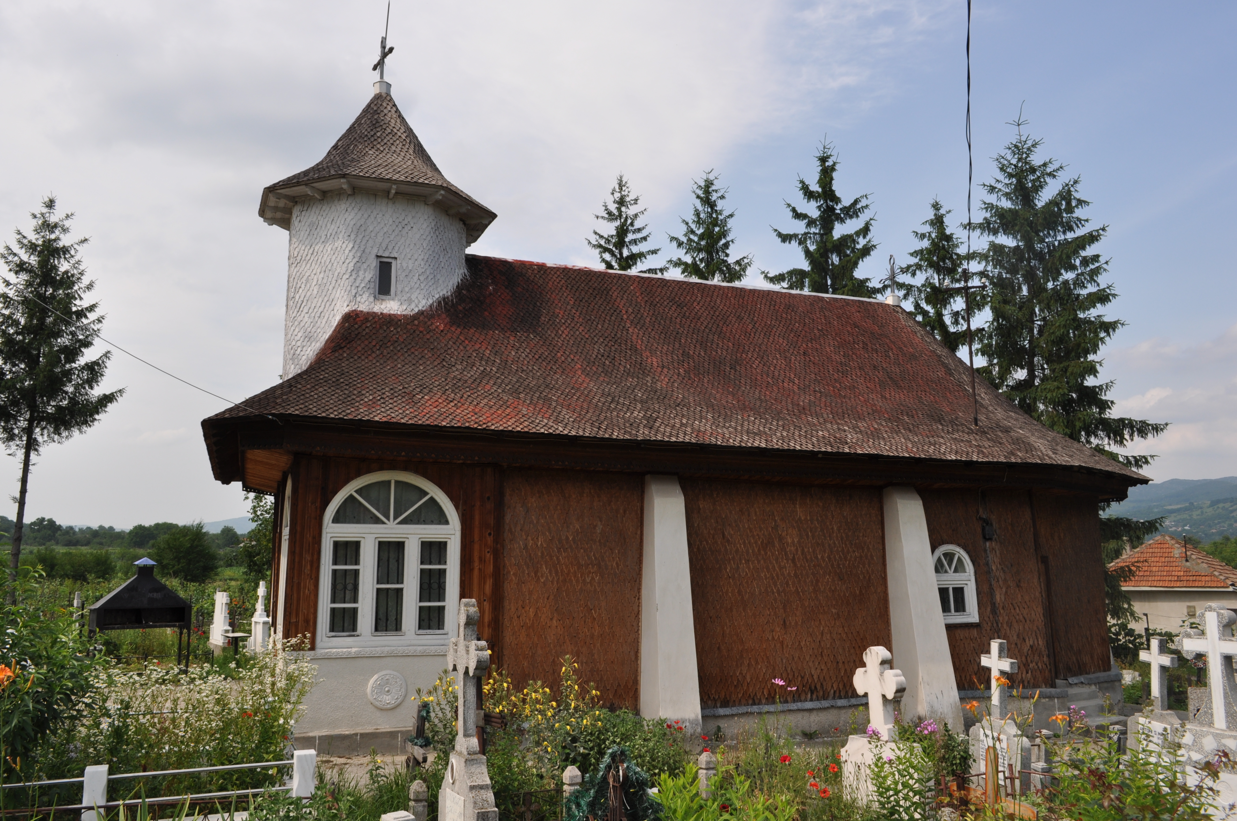 Negoiești, Bacău